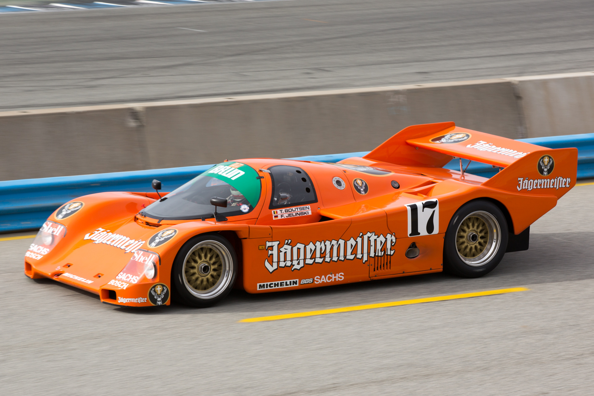 Rennsport Reunion V